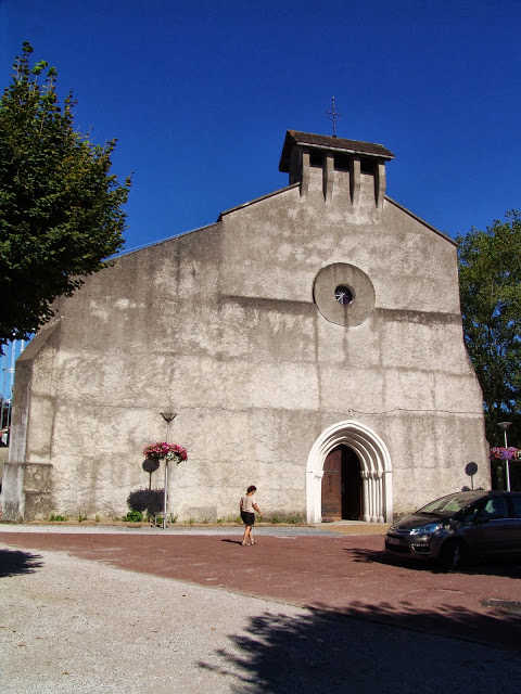 Die Kirche